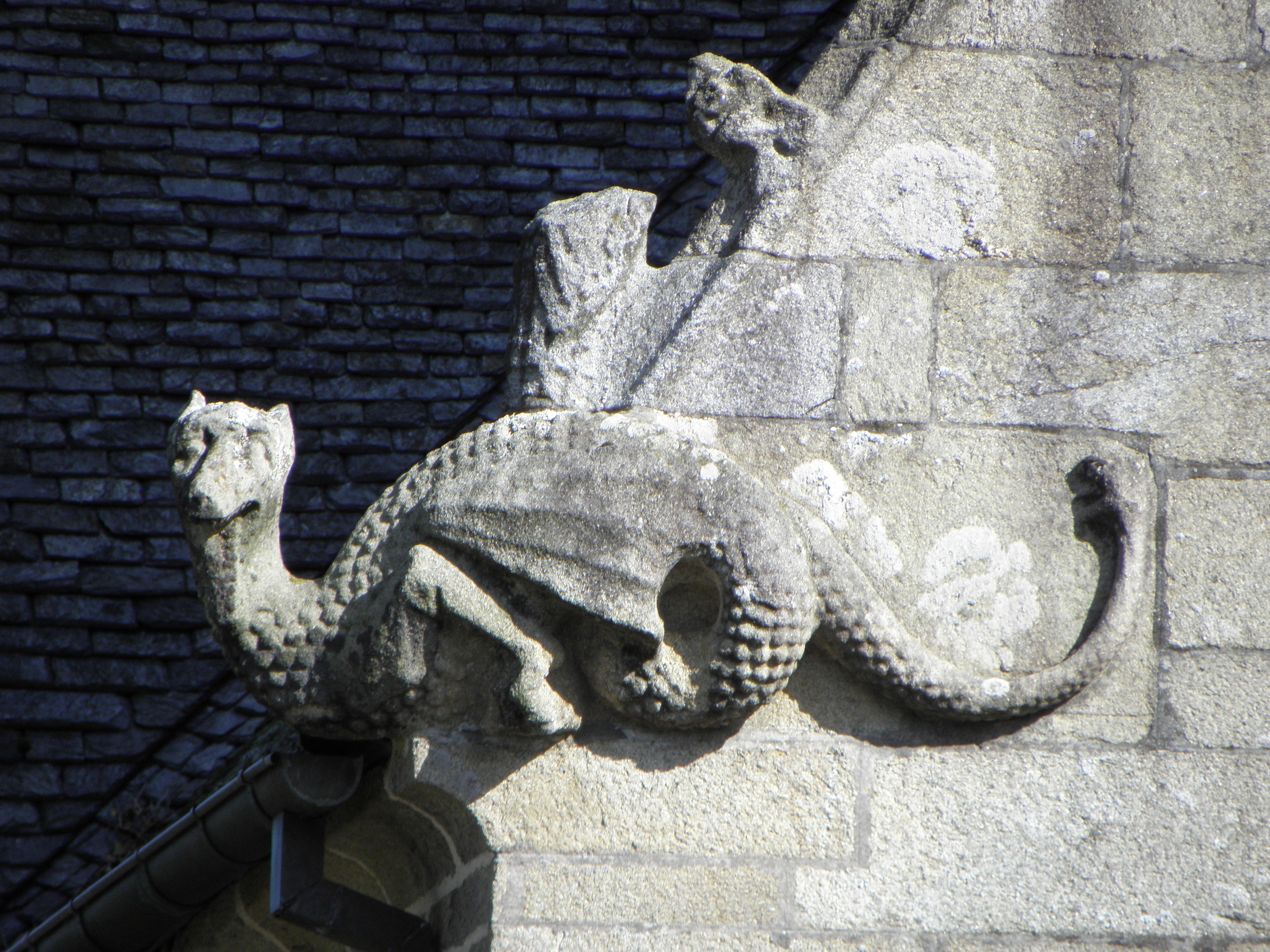 Maison prébendale sise 1 rue du Petit-Cloître à Saint-Pol-de-Léon (29). .